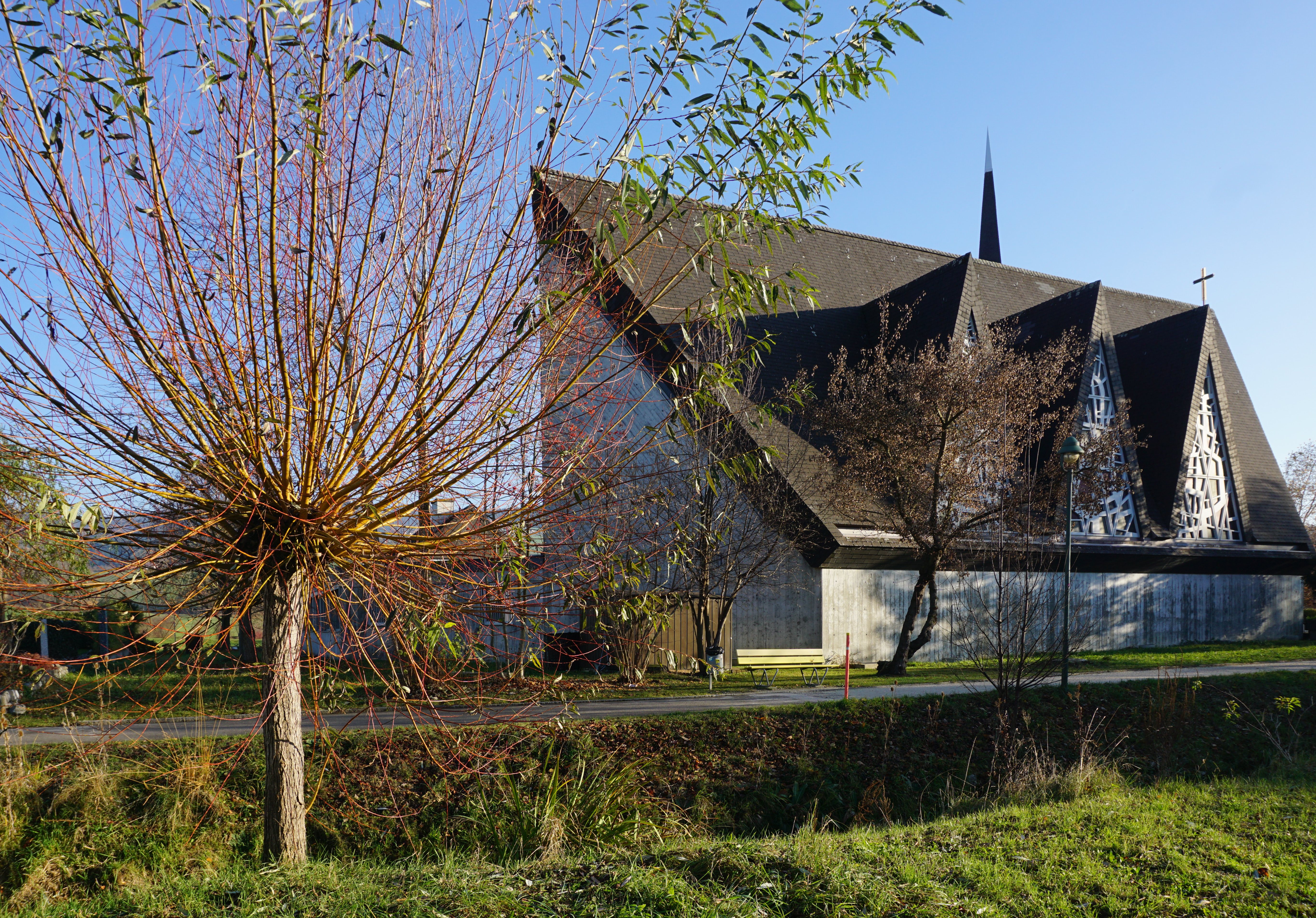 Römisch-katholische Auferstehungskirche Konolfingen. Westansicht